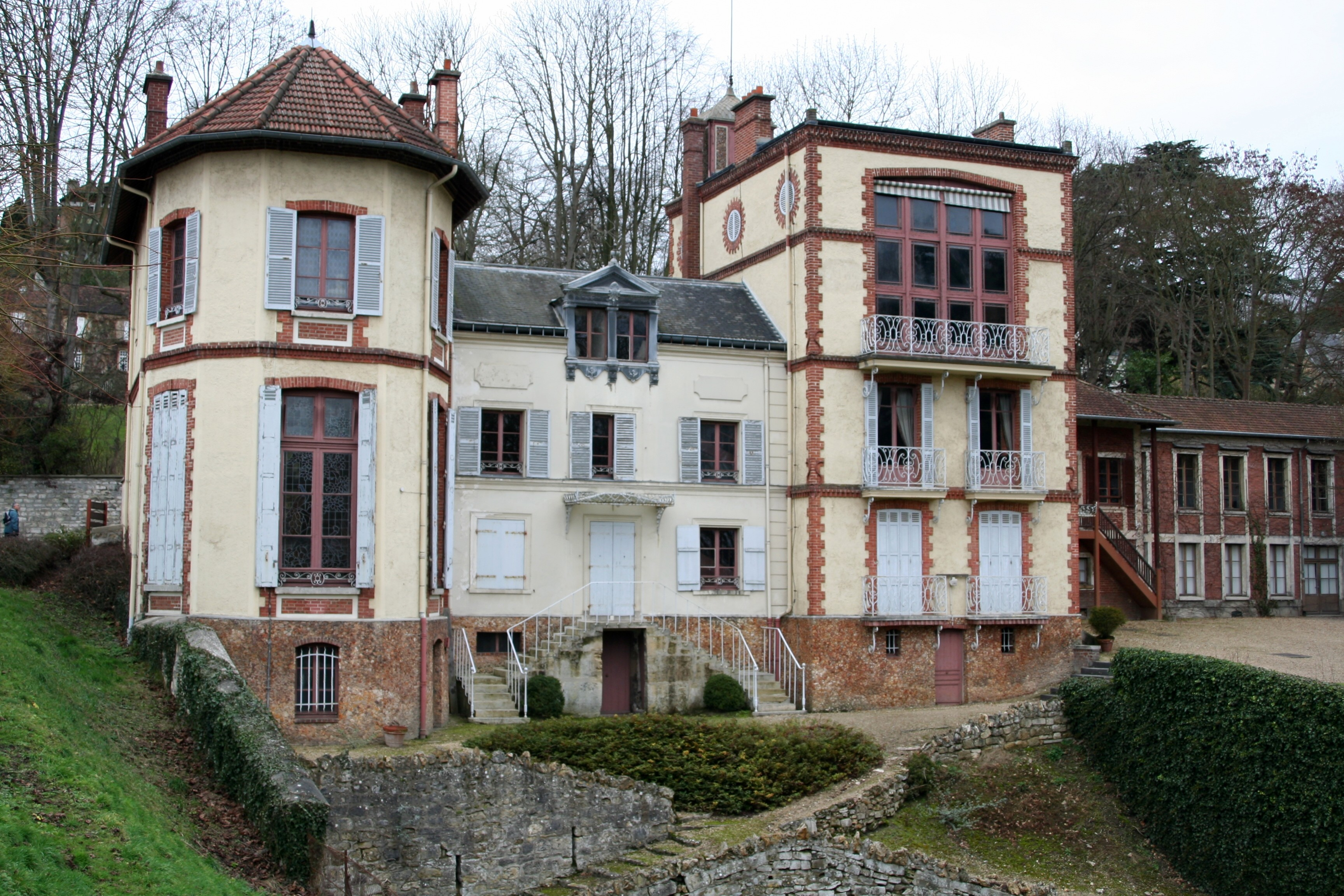 Maison d'Émile Zola à Médan - Yvelines (France).